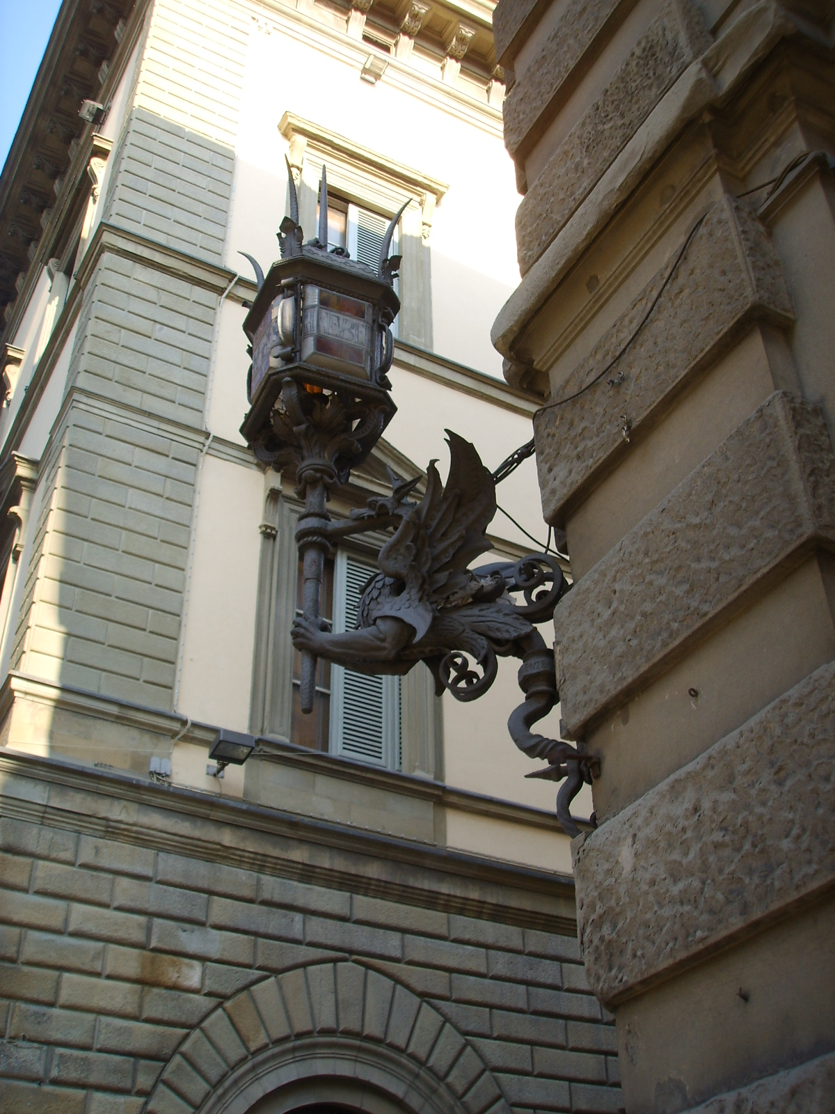 Lanterna del grifone, fonderia fiorentina dei Fratelli Biondi 1926